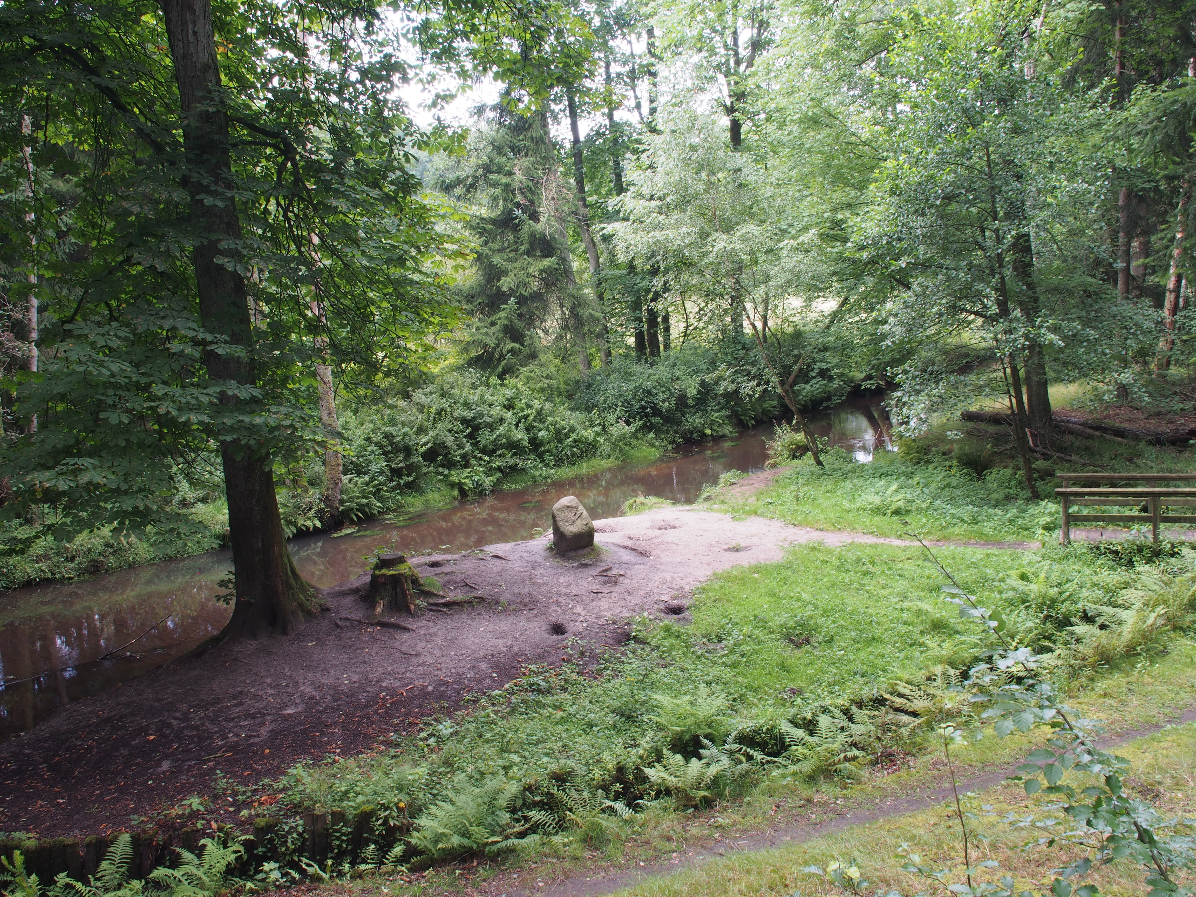 Die Bohme nördlich von Soltau, mit Schlageterinsel